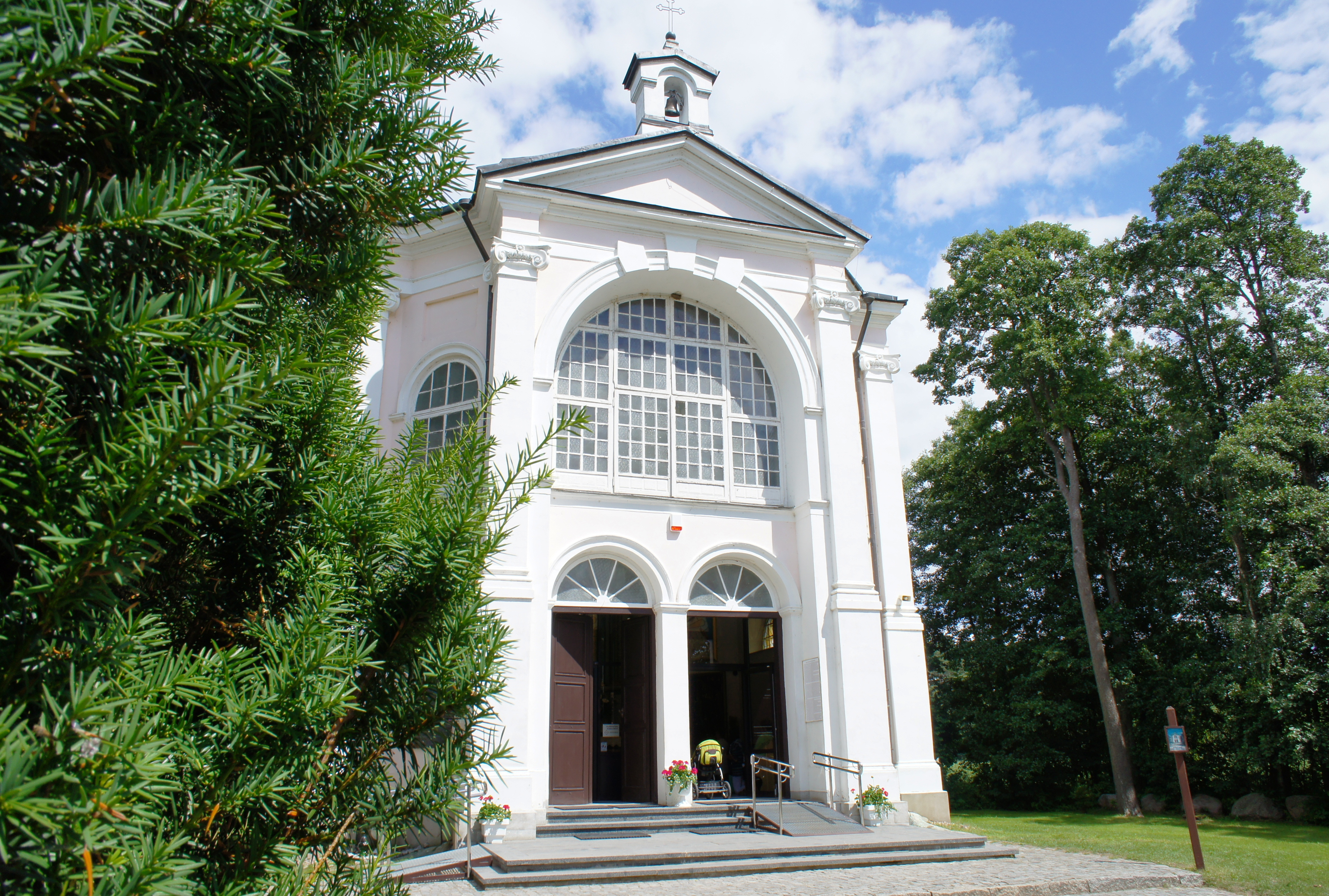 Kaplica Matki Boskiej w Augustowie-Studzienicznej (zabyzek nr 77 z 15.03.1980)